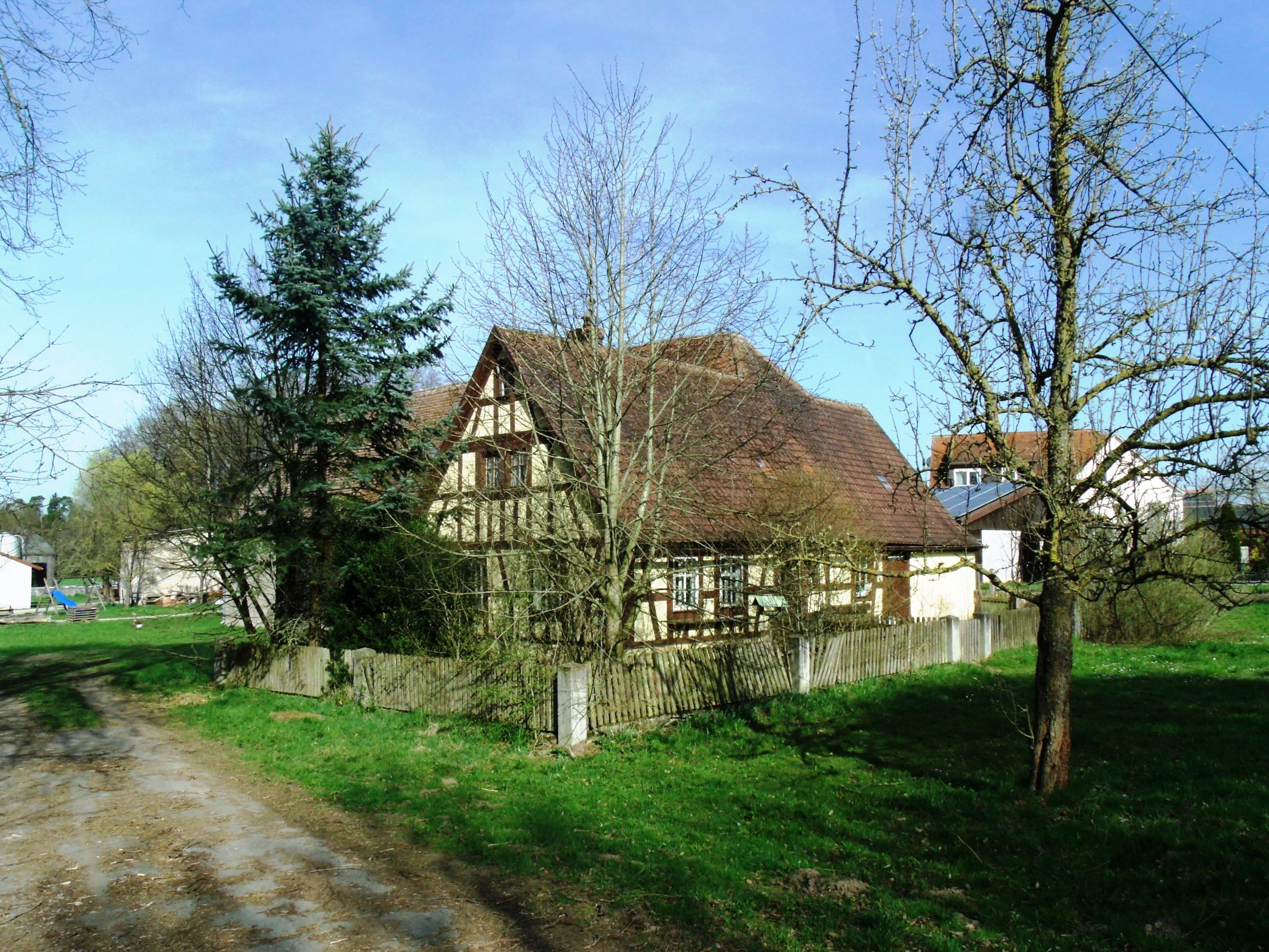 Bauzenweiler, Ortsteil von Leutershausen im Landkreis Ansbach, Fachwerk-Häuschen